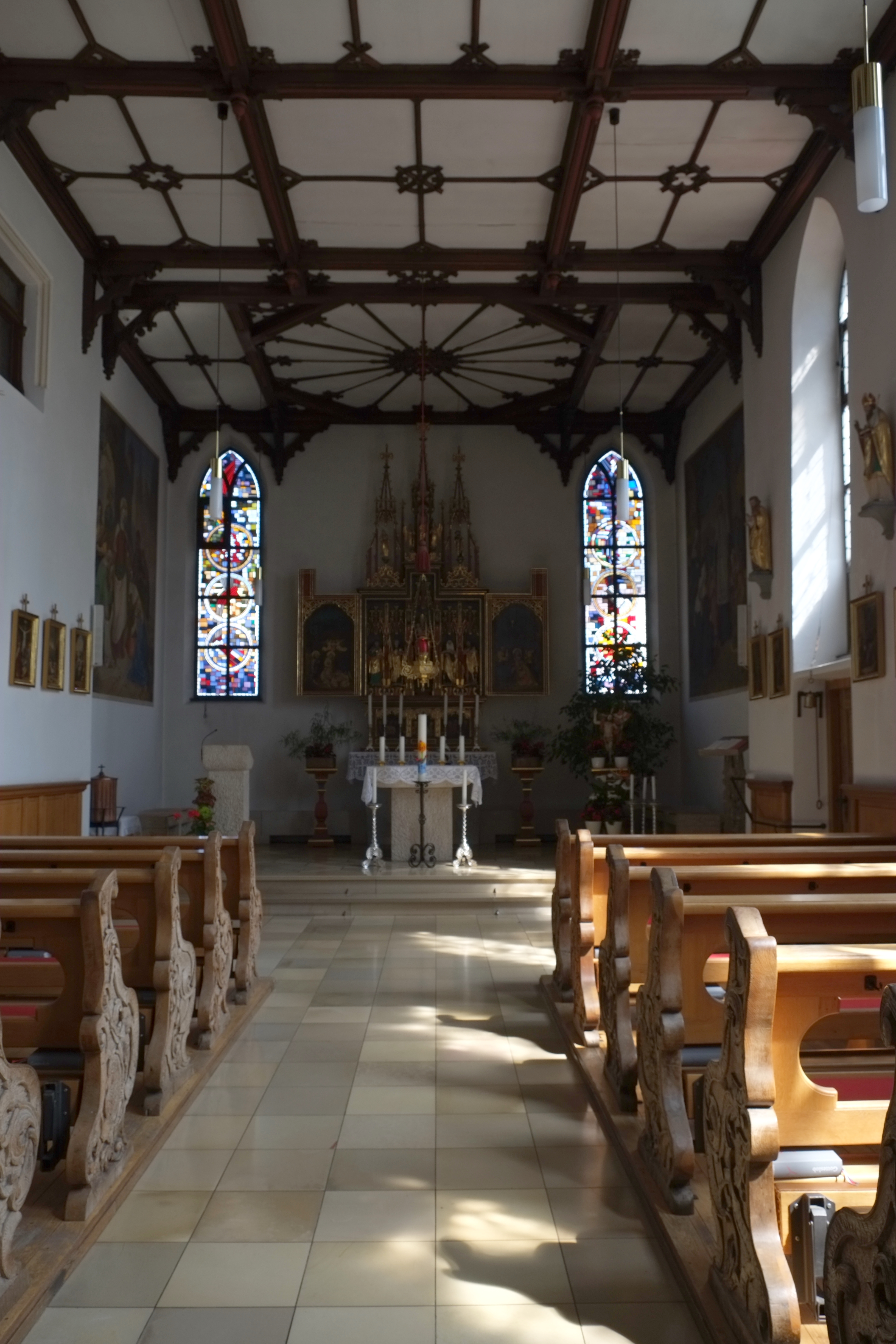 Spitalkapelle Mariä Himmelfahrt in Dinkelscherben im Landkreis Augsburg (Bayern, Deutschland)